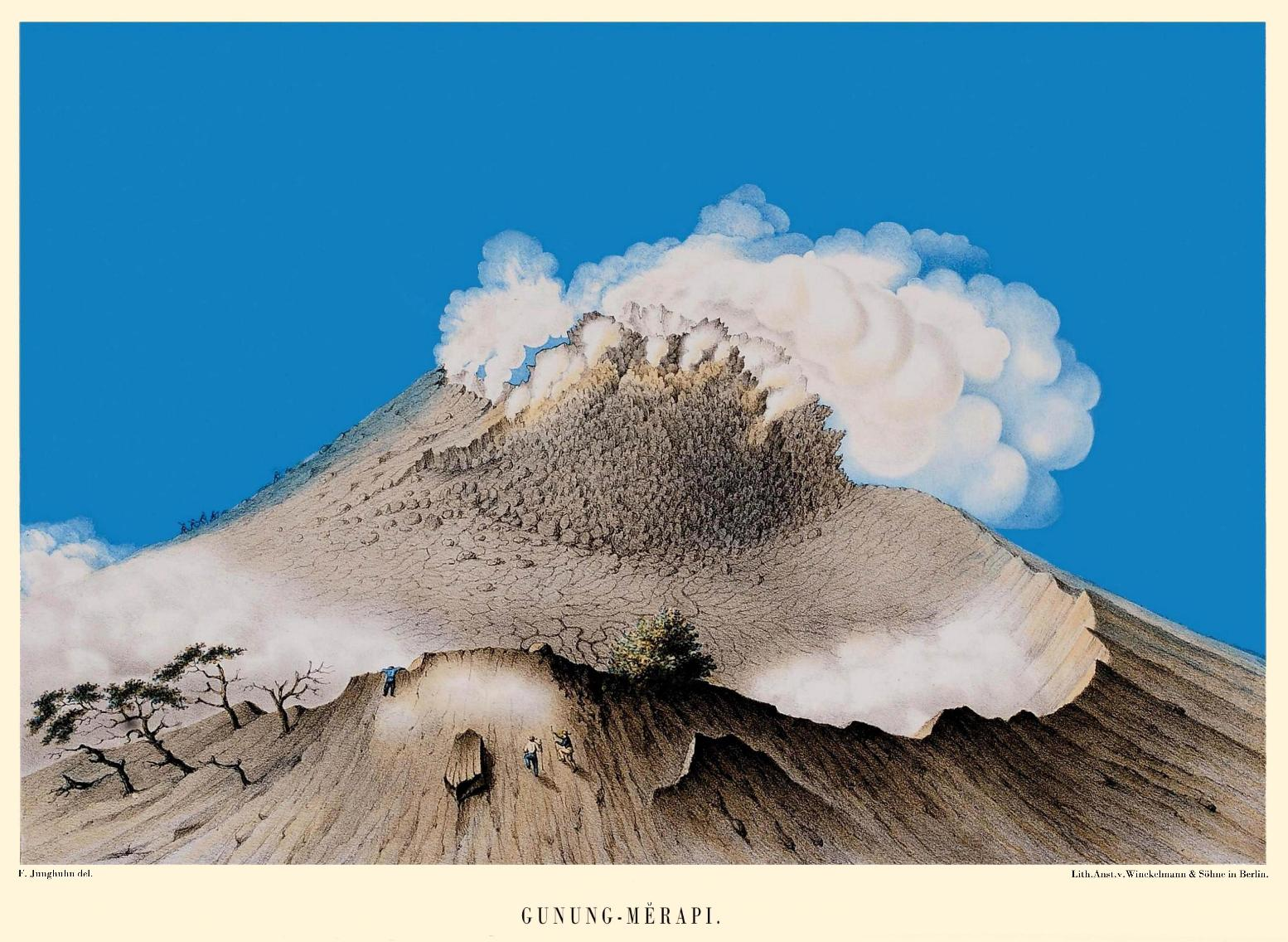 Gunung Merapi